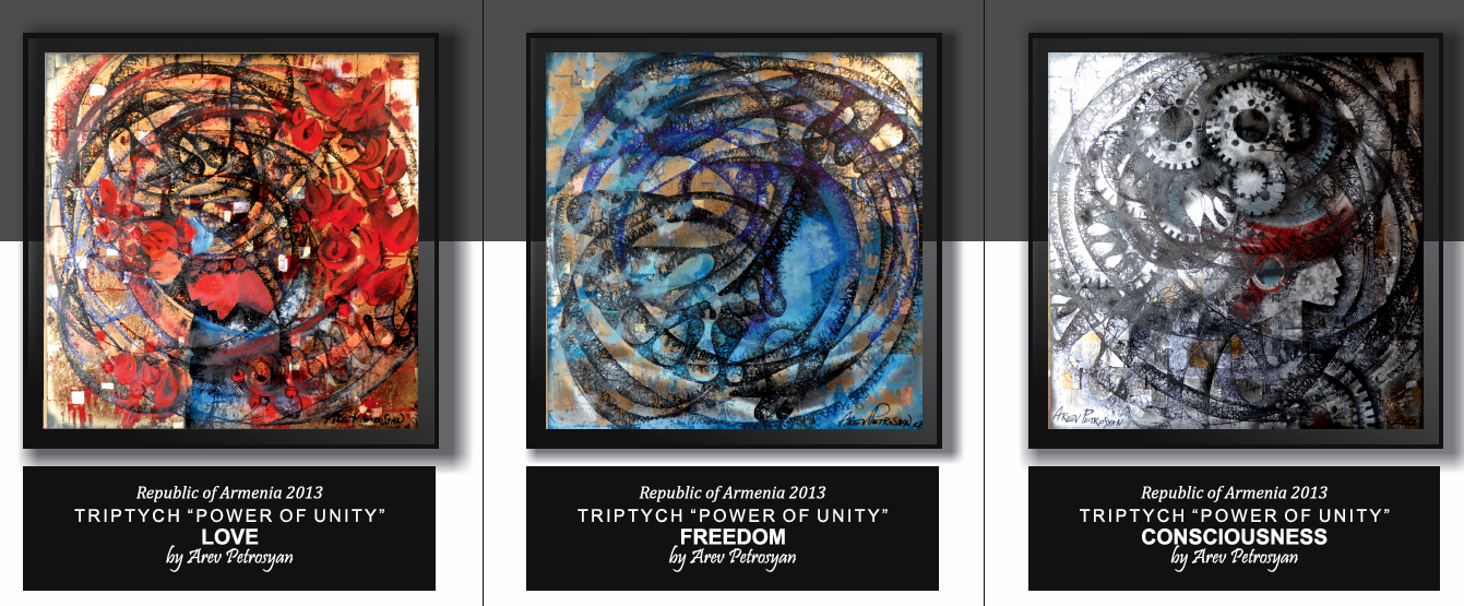 Նկարչուհի-ձևավորող Արև Պետրոսյան